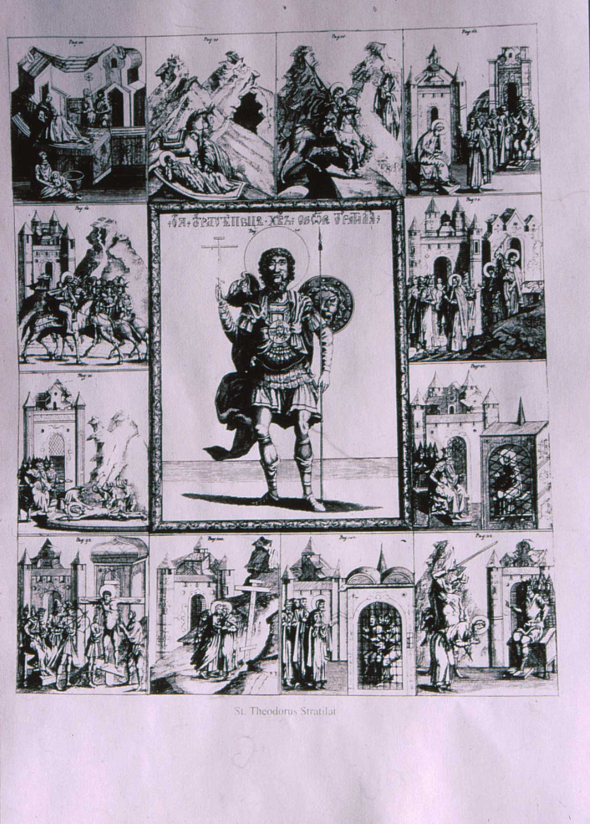 Гравюра с изображением иконы «Феодор Стратилат в житии»